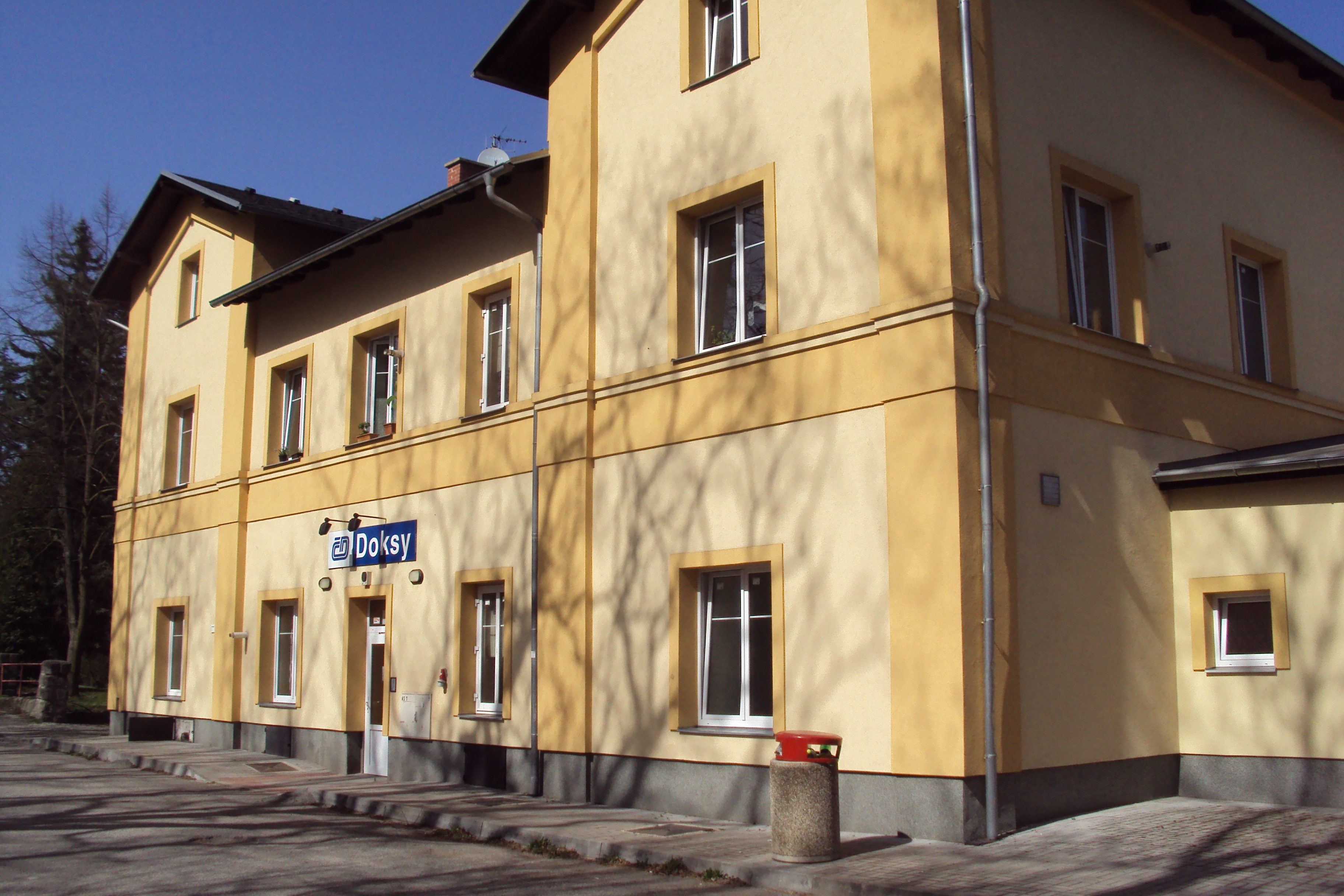 Vlakové nádraží Doksy, vchod